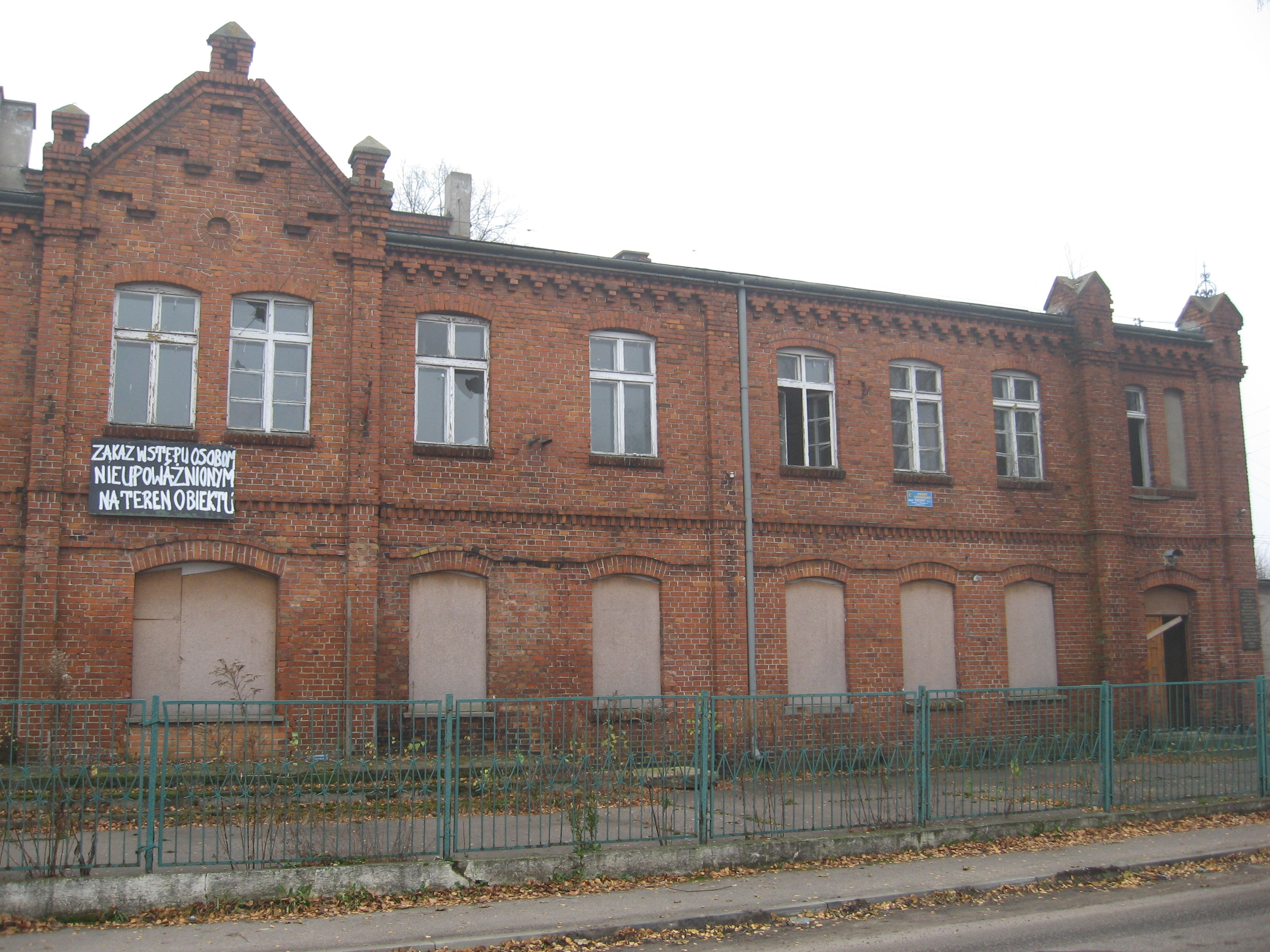 Iłowo-Osada - Budynek, w którym po II wojnie światowej mieściła się Zasadnicza Szkoła Zawodowa, a wcześniej (przed wojną) Towarzystwo Okrętowe (zajmujące się emigrantami z terenów Polski do Ameryki) oraz (w czasie okupacji hitlerowskiej) budynek zajmowany służby SS (obok znajdował się przejściowy obóz hitlerowski).